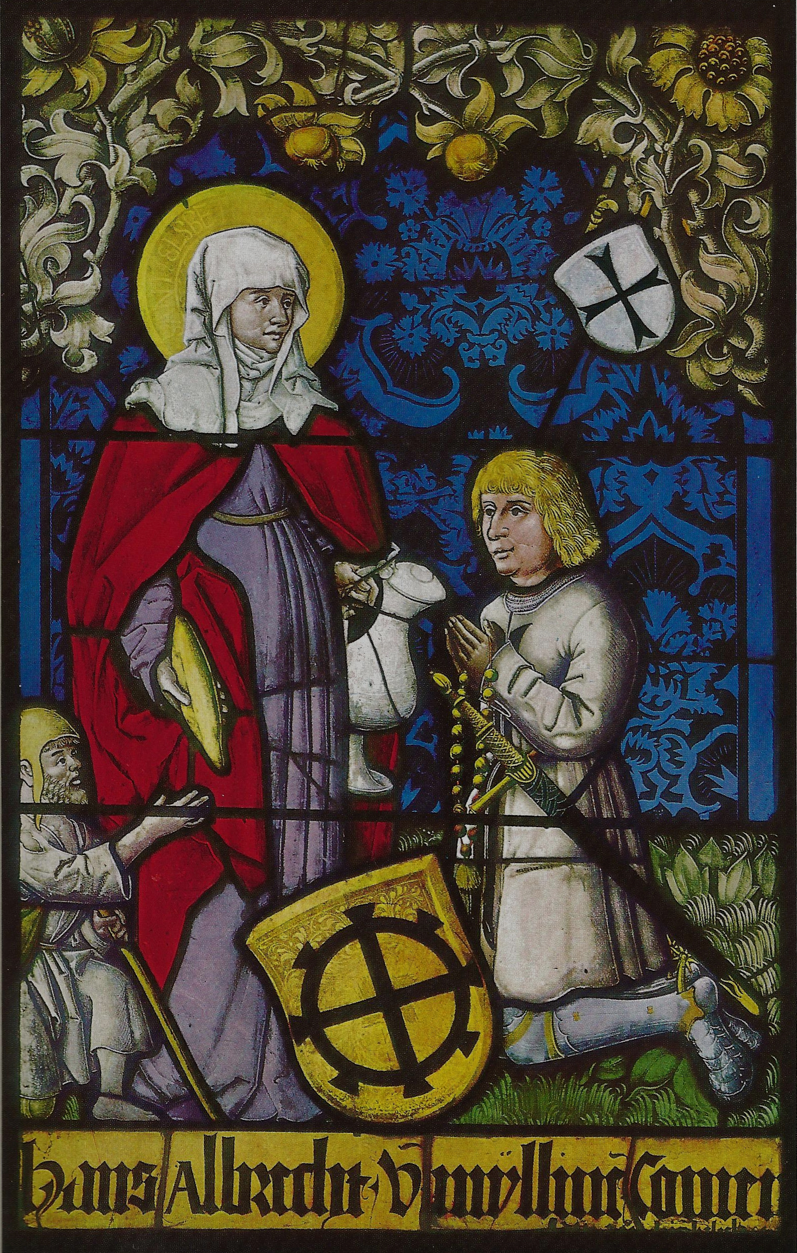 Sumiswald, Hans Albrecht von Mülinen